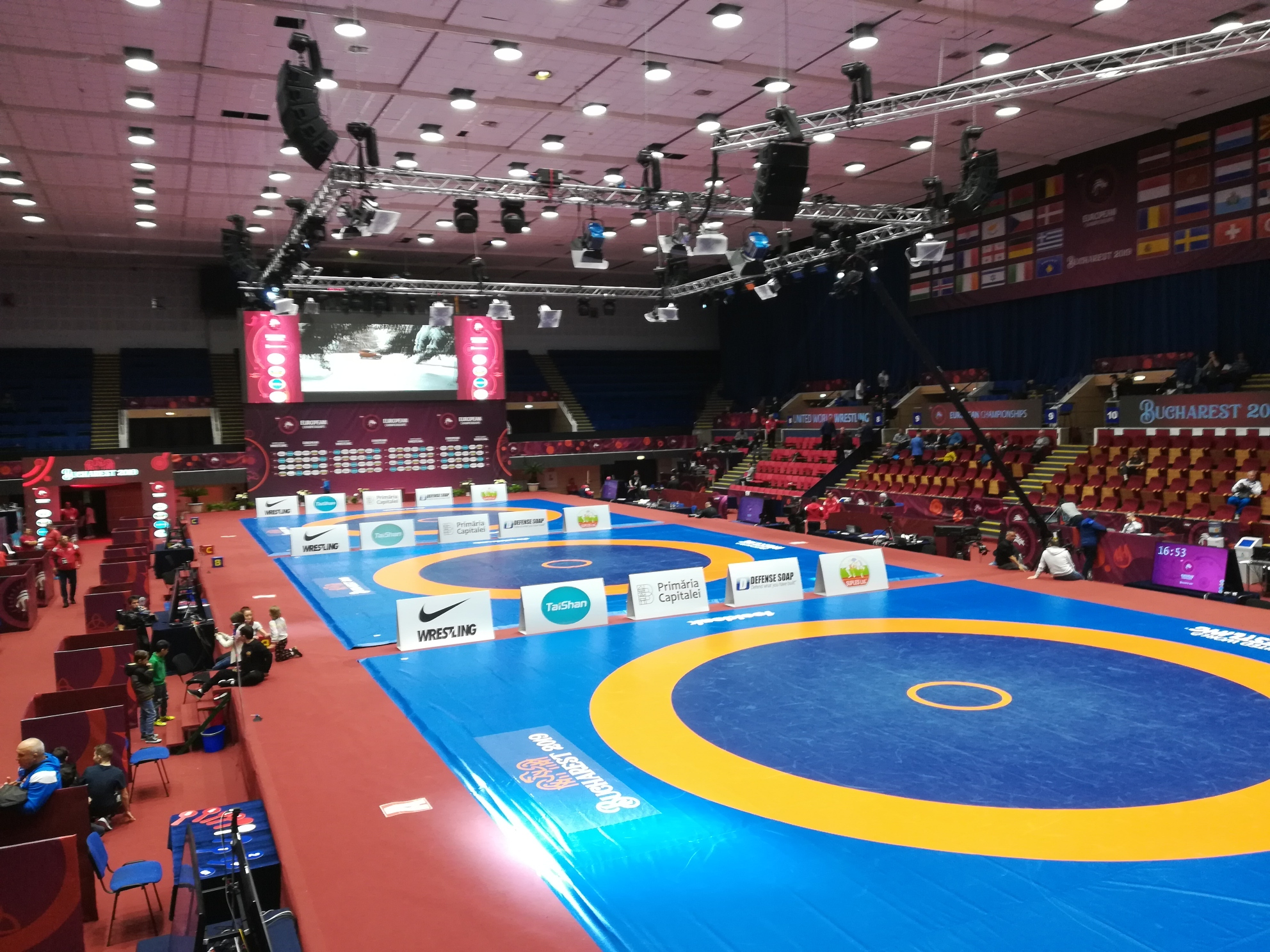 Matten bei den Ringer-Europameisterschaften in der Polyvalent Hall (Mehrzweckhalle) von Bukarest